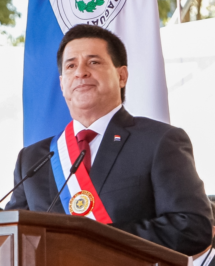 El presidente paraguayo Horacio Cartes, da su primer discurso como jefe de estado. A la izquierda se distinguen los mandatarios Dilma Rousseff y Ollanta Humala.